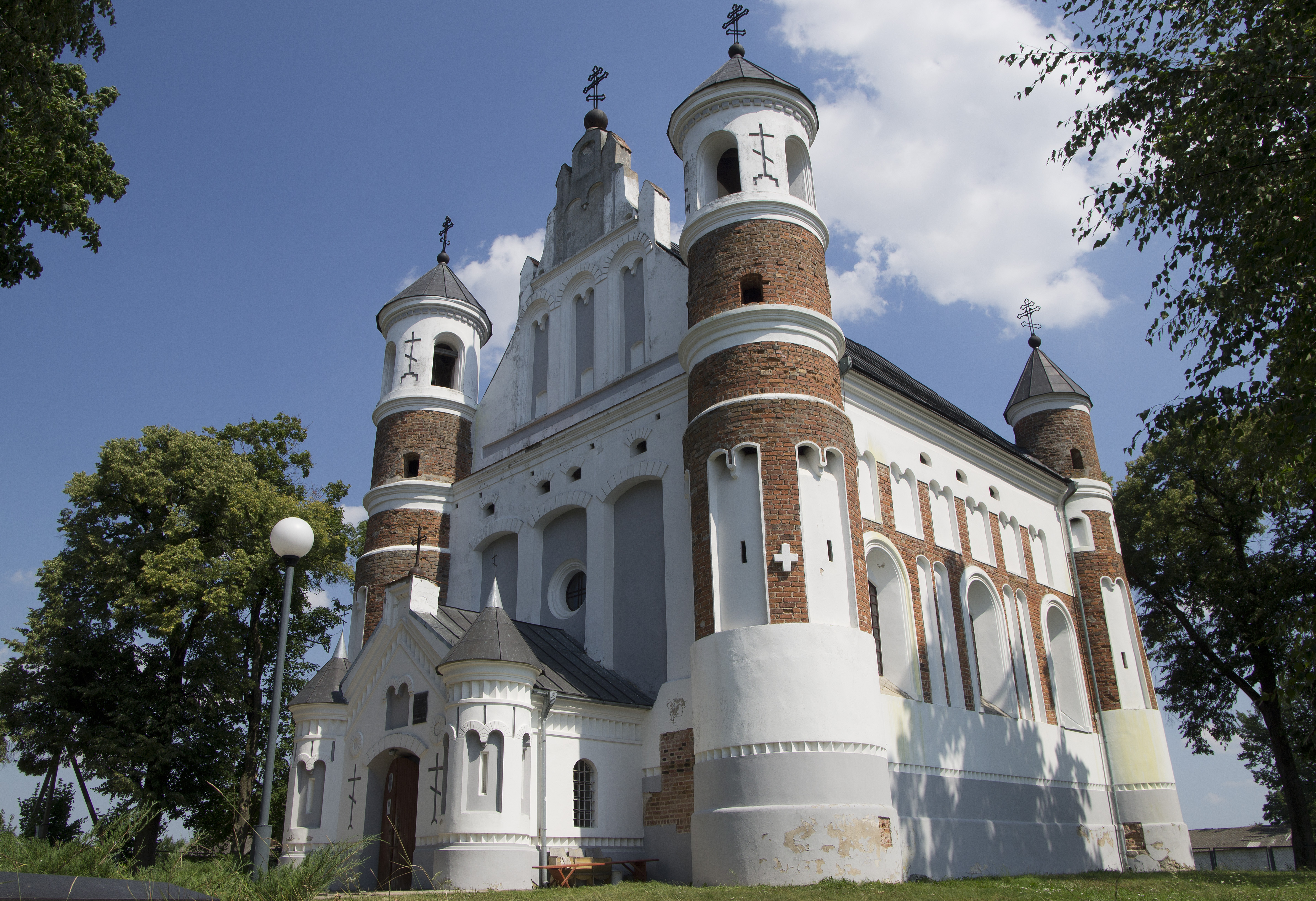 Сьвята-Раства-Багародзіцкая царква(крэпасьць абарончага тыпу) This is a photo of Belarusian heritage monument. Reference number: 410Г000638 ( WLM)